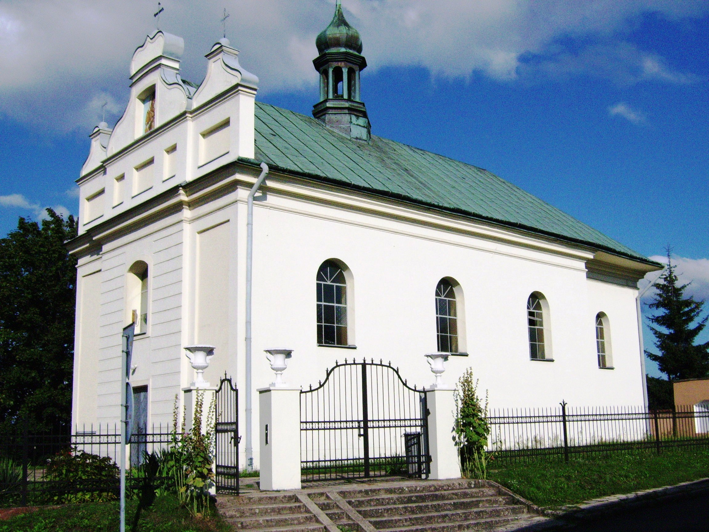 Leżajsk, ul. Jarosławska - cerkiew greckokatolicka pw. Zaśnięcia Bogurodzicy (zabytek nr 391 z 11.09.1971)